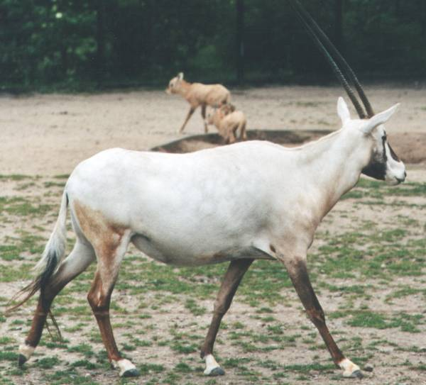 Tierpark Berlin - Arabische Oryx (Oryx gazella leucoryx)